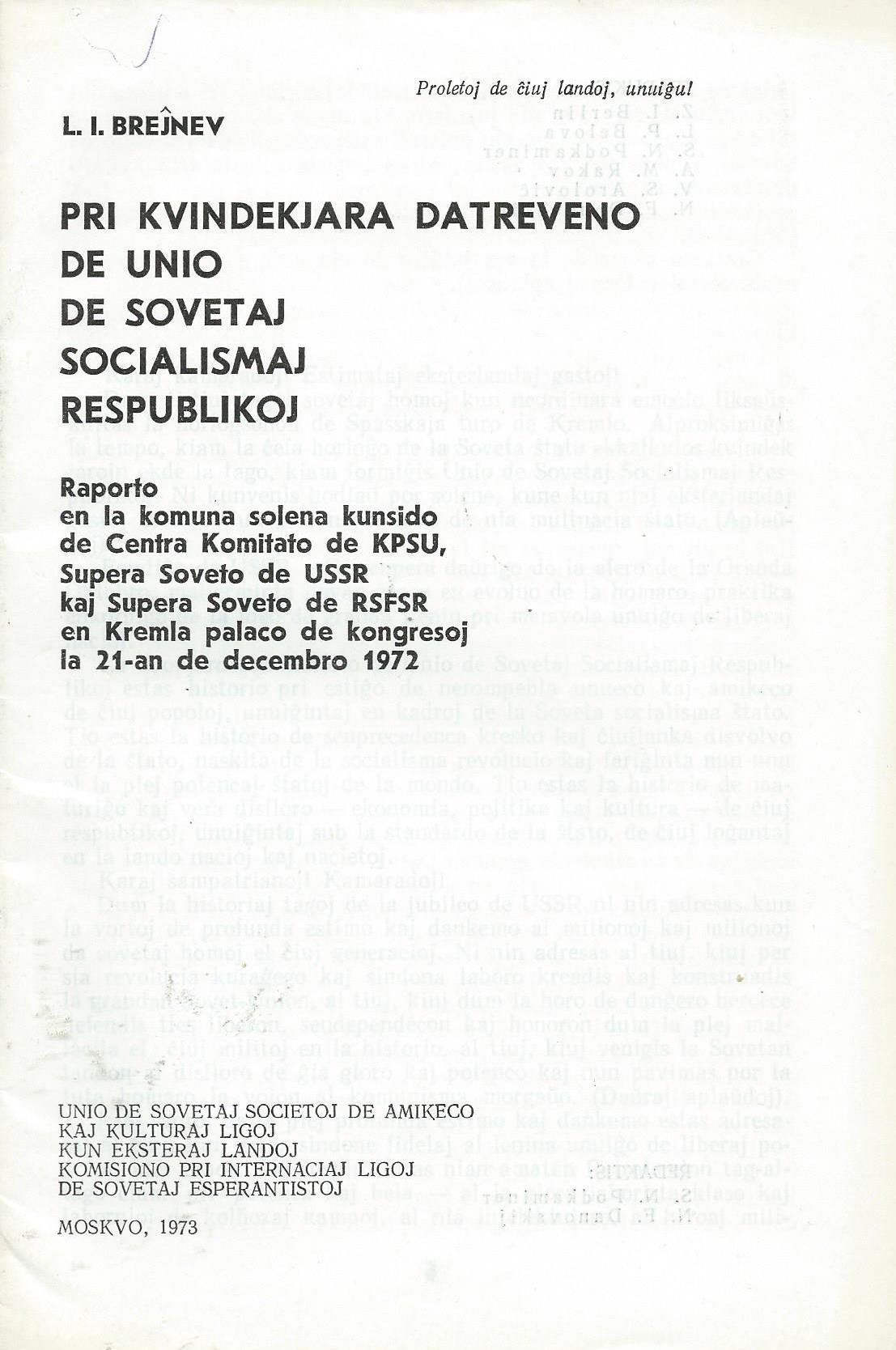 librokovrilo de "Ledenlijst der Nederlandsche Esperantisten-vereniging "Pri Knindekjara Jarreveno de Unio de Sovetaj Socialismaj Respublikoj", 1973